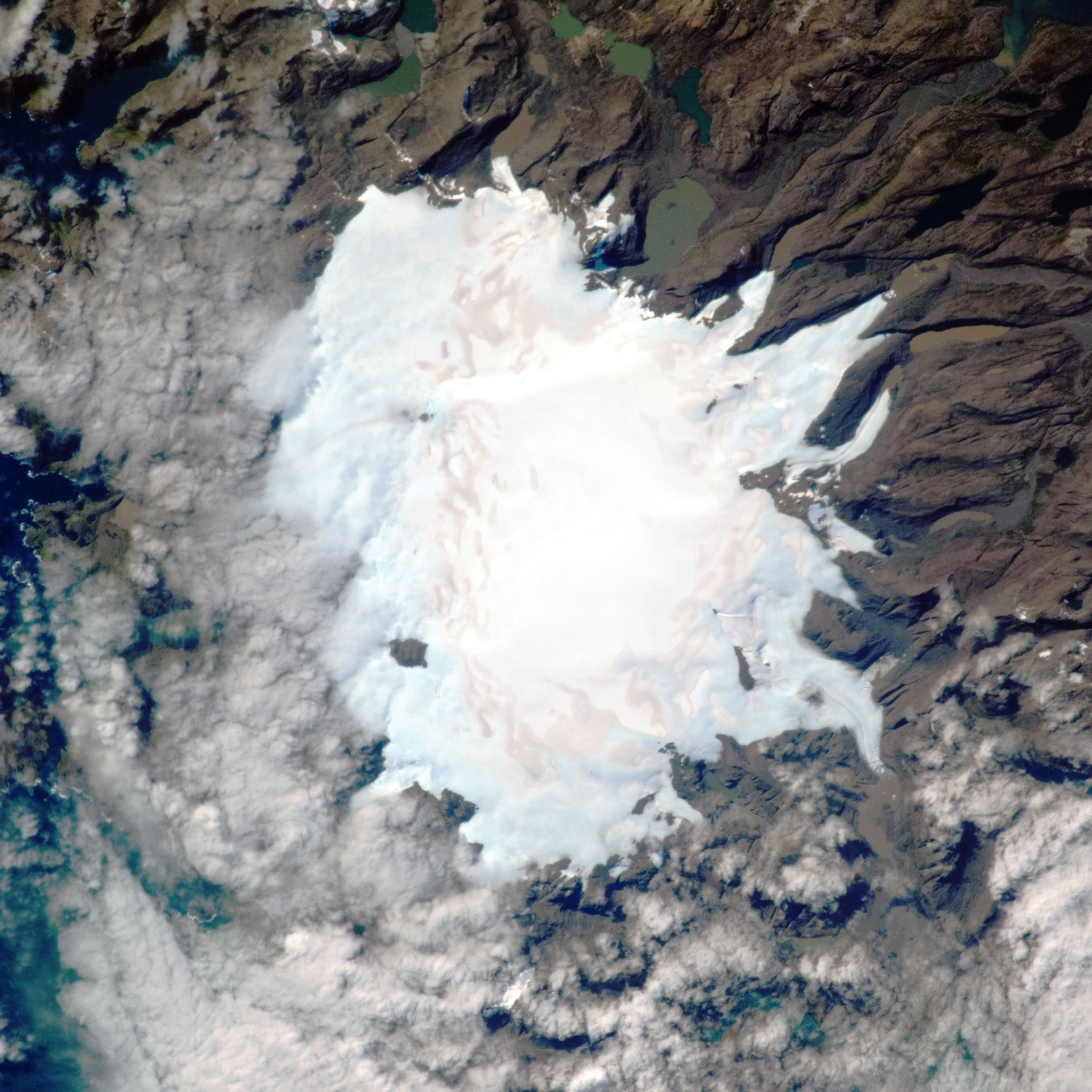 Calotte glaciaire Cook